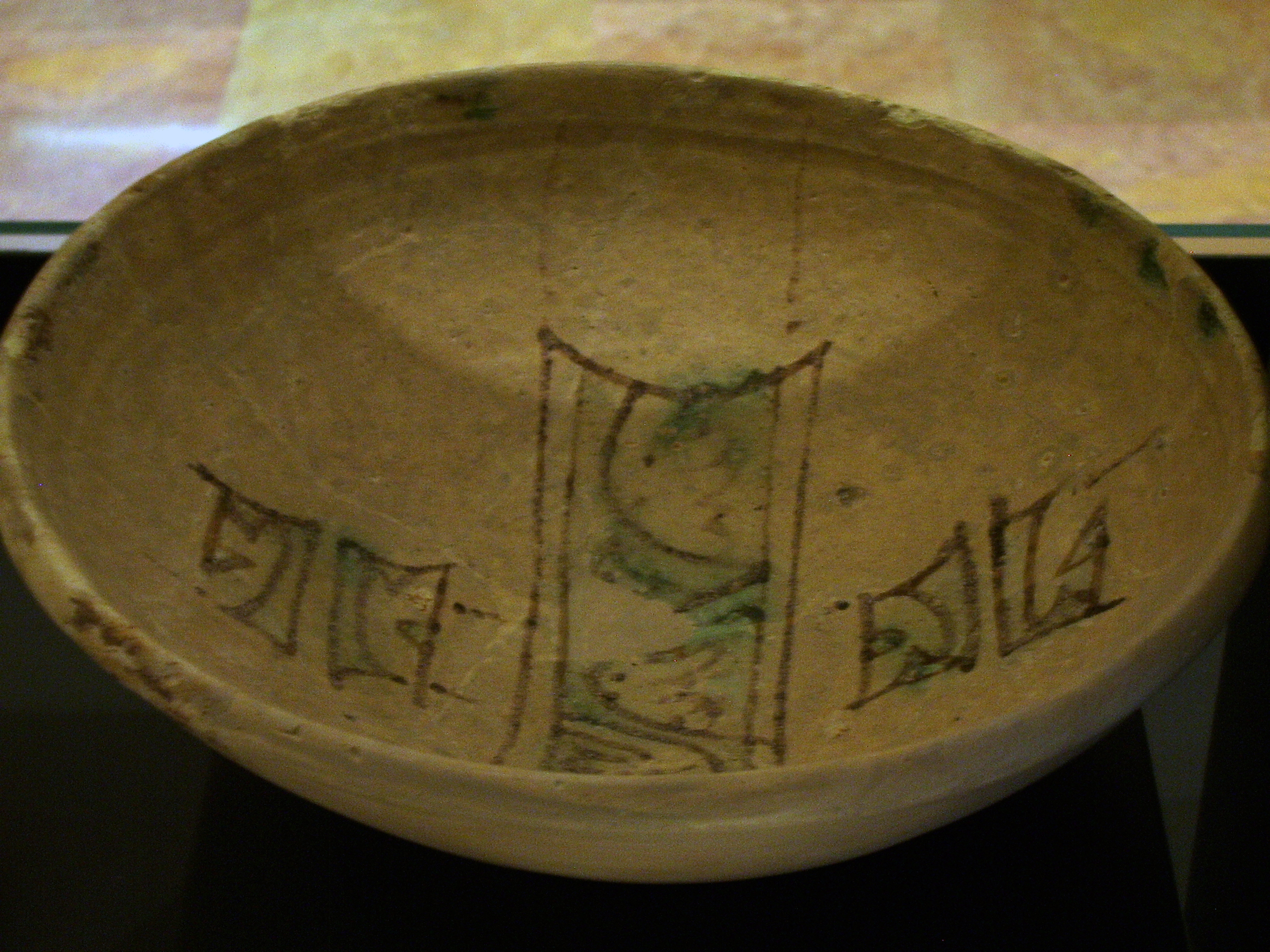 Ataifor andalusí del siglo XI, de cerámica verde y manganeso en Aragón. (Museo del Teatro Romano de Cesaraugusta, Zaragoza).